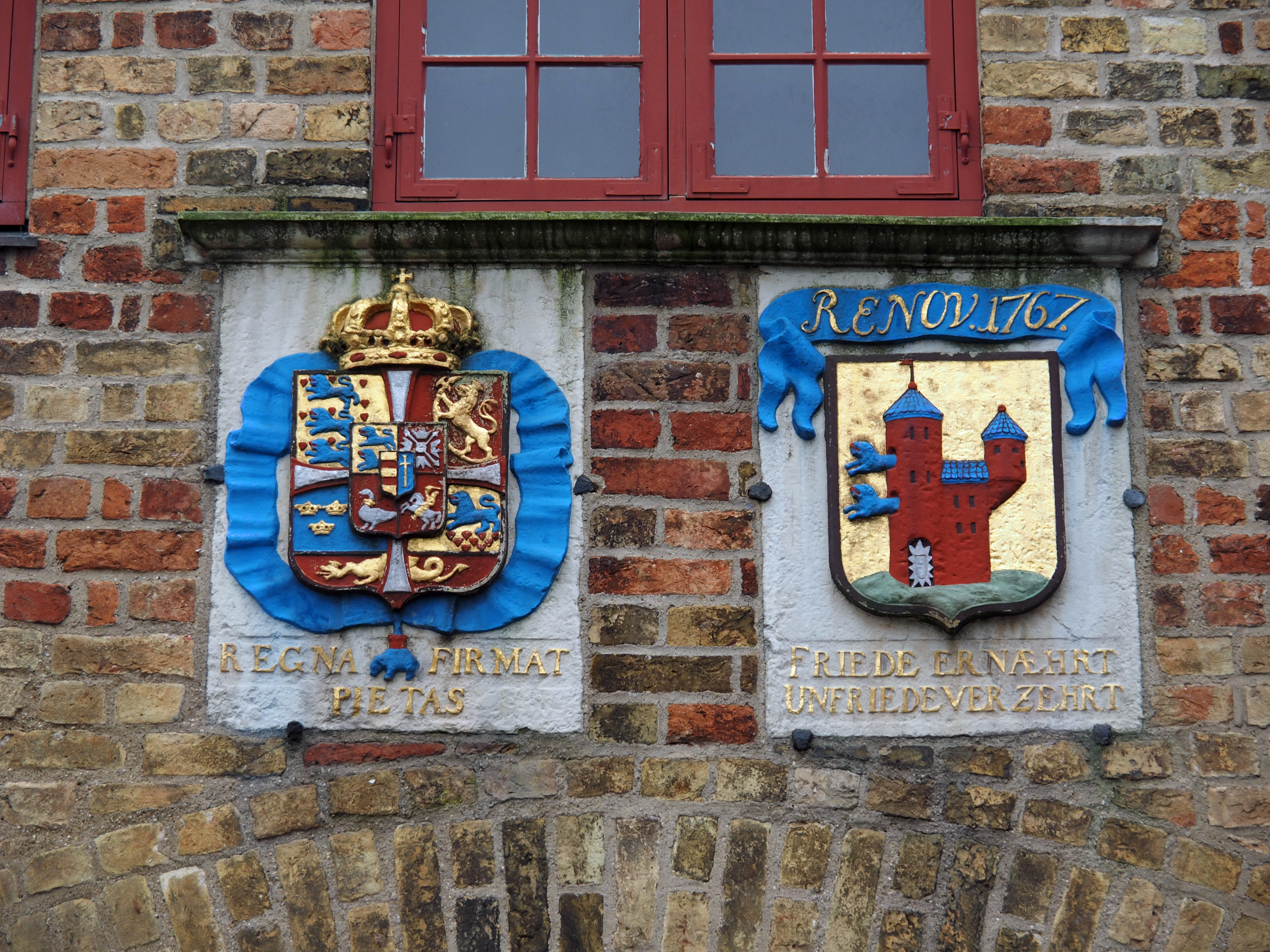 Flensburger Stadtwappen und das Wappen des dänischen Königs Christian IV an der Nordseite des Nordertores in Flensburg